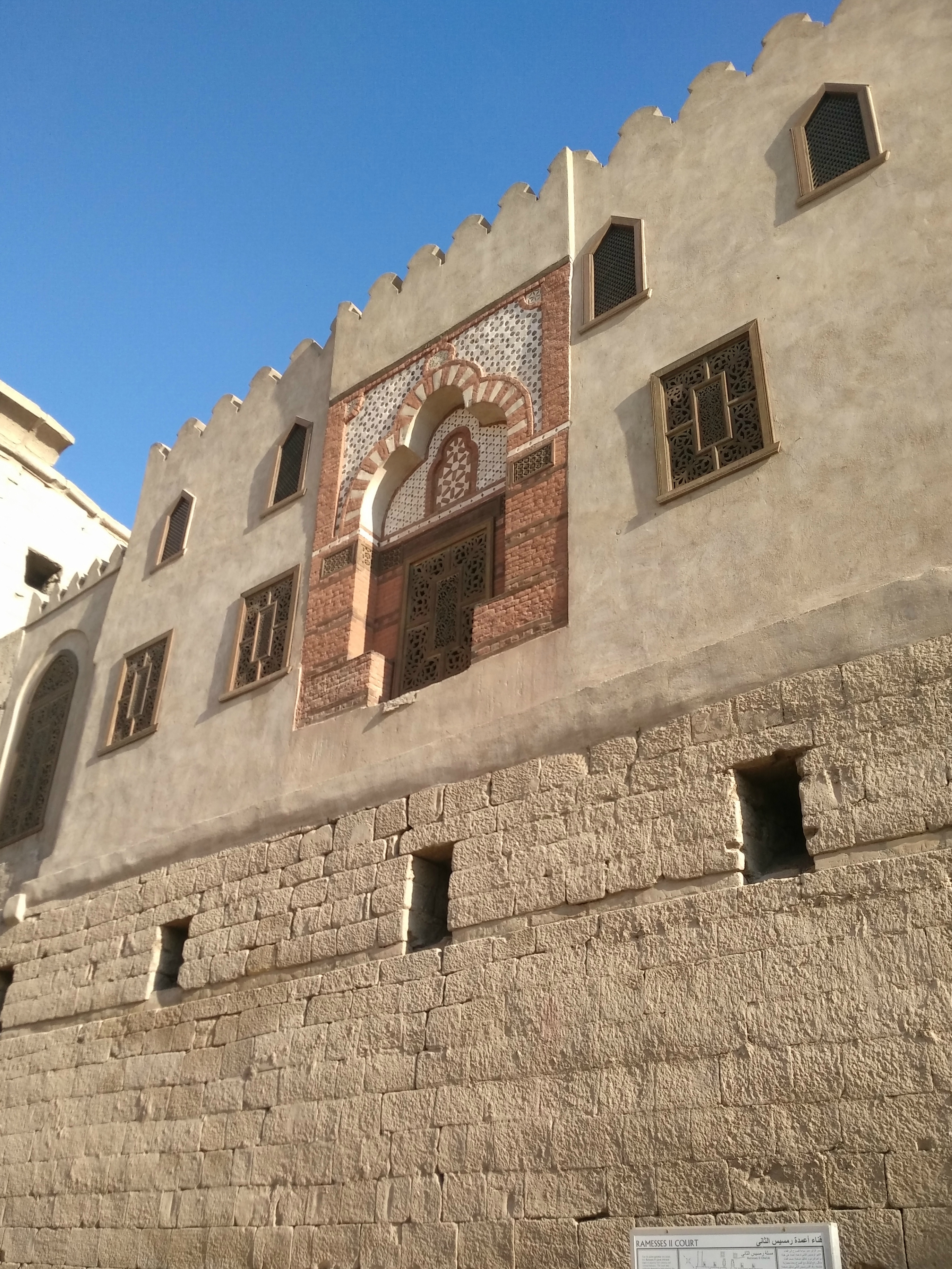 Old entrance of Abu Haggag Mosque before discovery Karnak Temple underneath